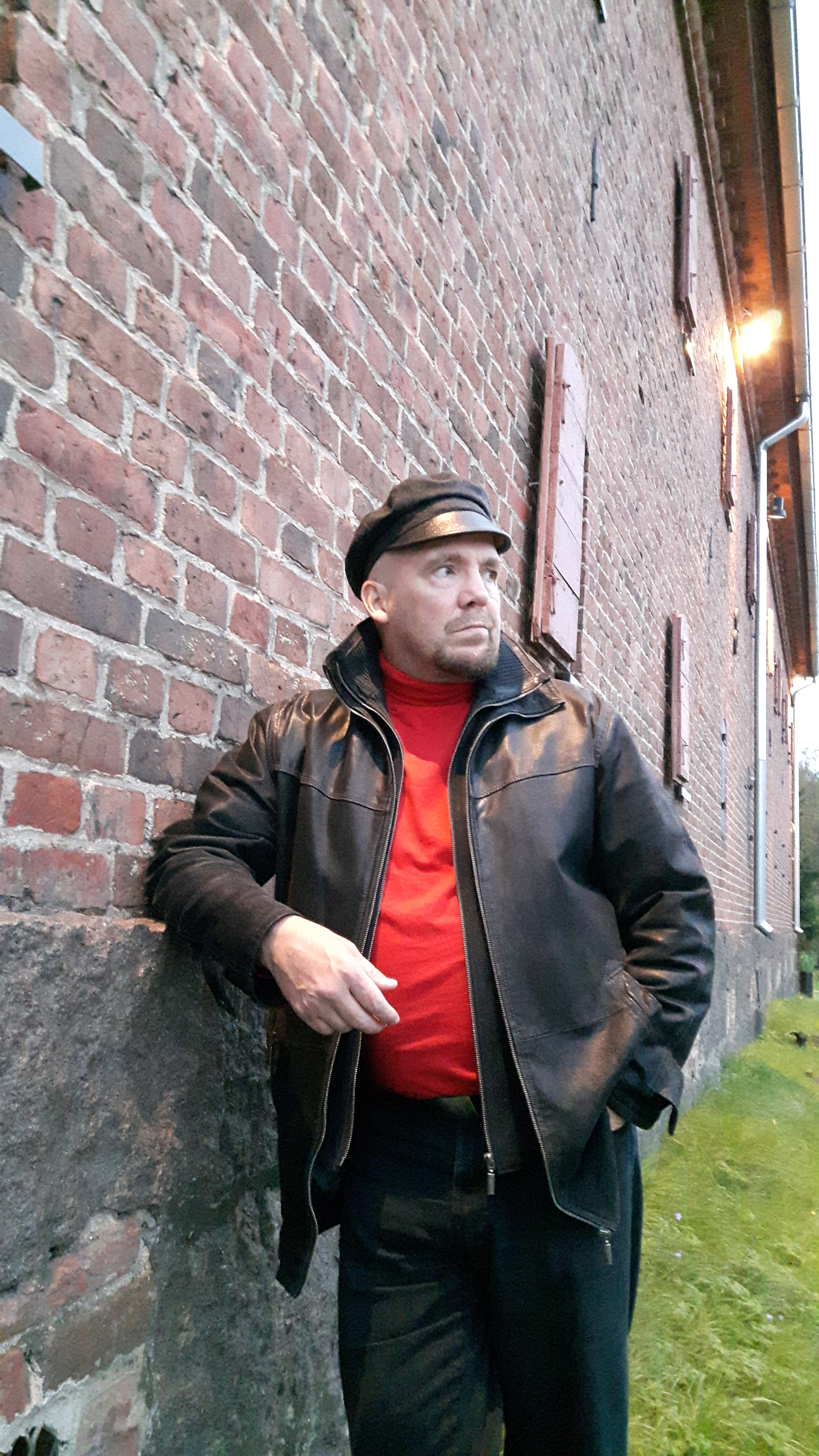 Kirjailija Pekka Jaatinen Raahen Kruununmakasiinimuseon edustalla syyskuussa 2016.